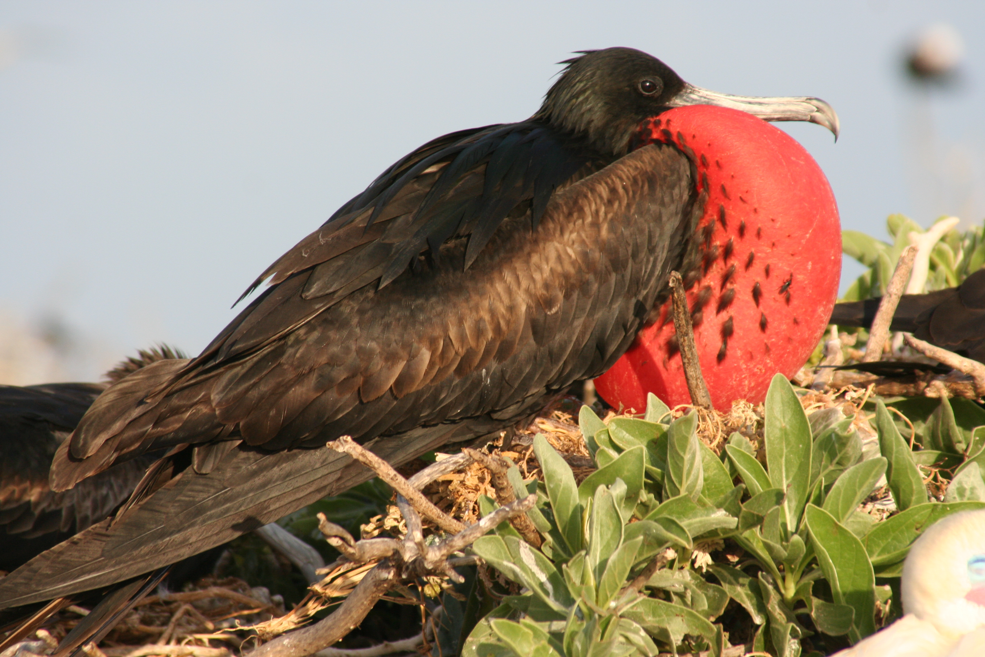 Great Frigatebird DISPLAYING (MALE)